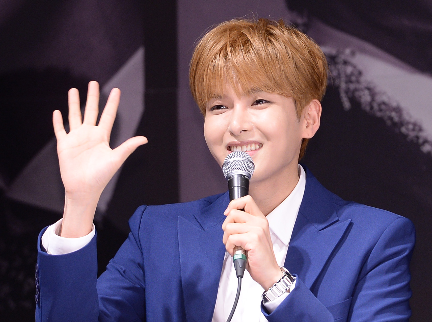 슈퍼주니어 멤버들이 15일 오후 서울 강남구 삼성동 코엑스 아티움에서 열린 스페셜 앨범 'Devil' 발매 기념 기자회견에서 인사를 하고 있다. 2015.07.15 / 이석우 기자